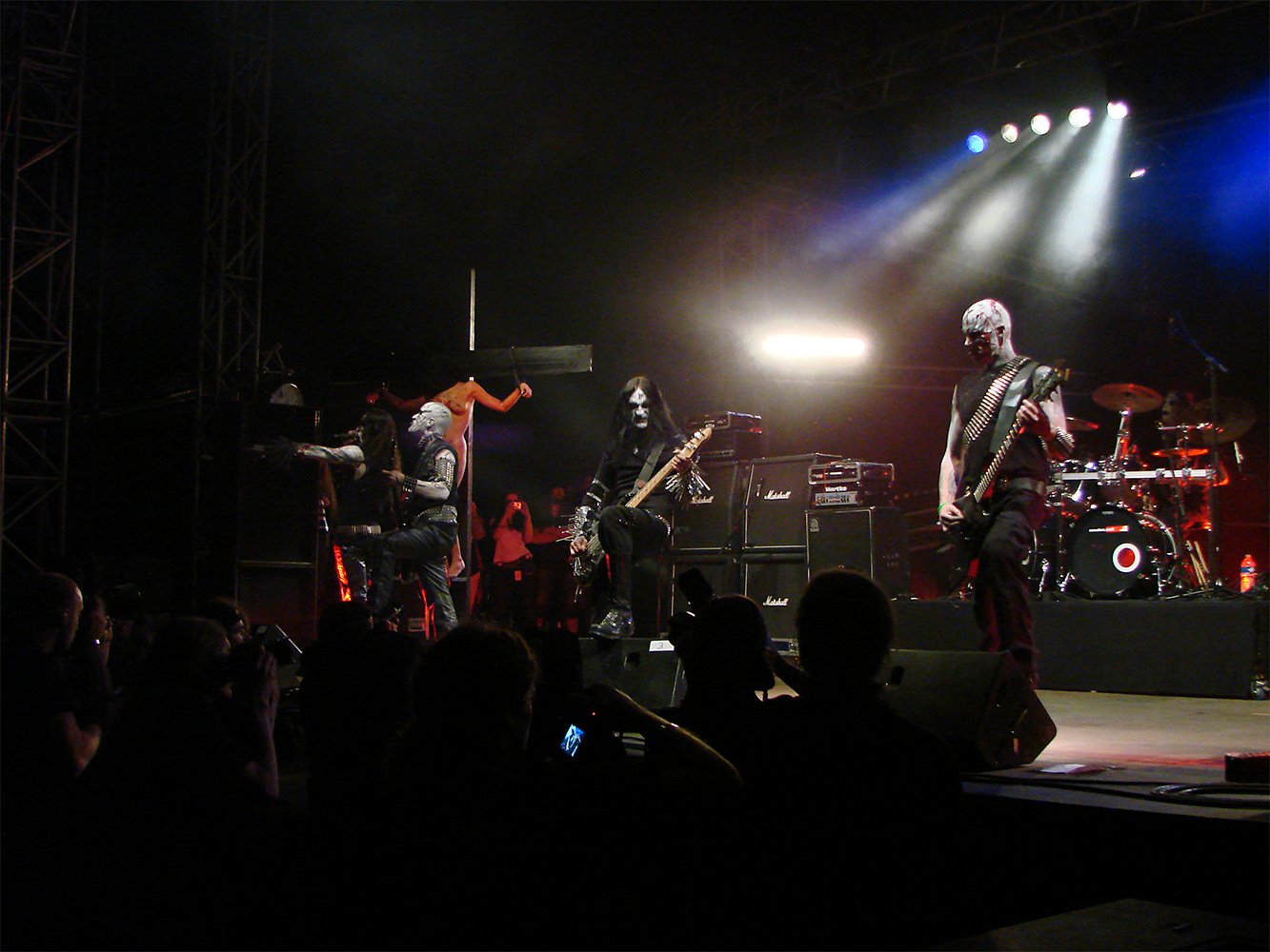 God Seed au Hellfest 2009.